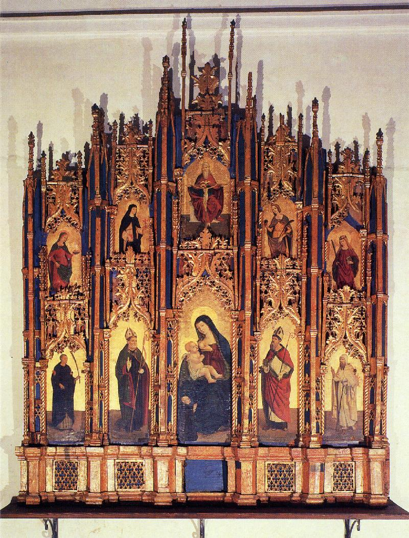 Pentittico di Castelbuono, già nell'Abbazia di S. Maria del Parto, circa 1470, attribuito a Pietro Ruzzolone e alla Scuola di Antonello da Messina. Copia dell'opera originale.